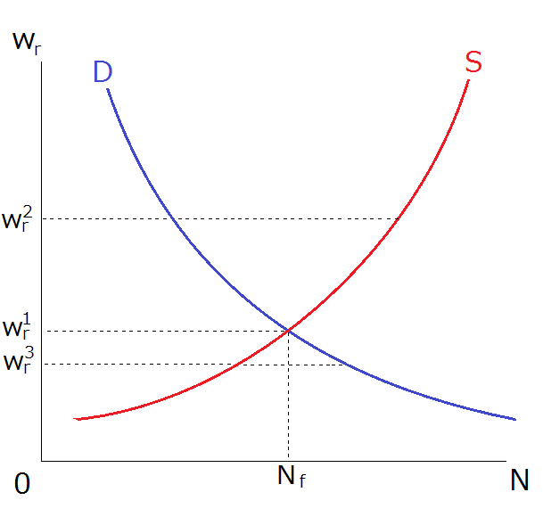 古典派の失業理論および自発的失業を図示したもの。